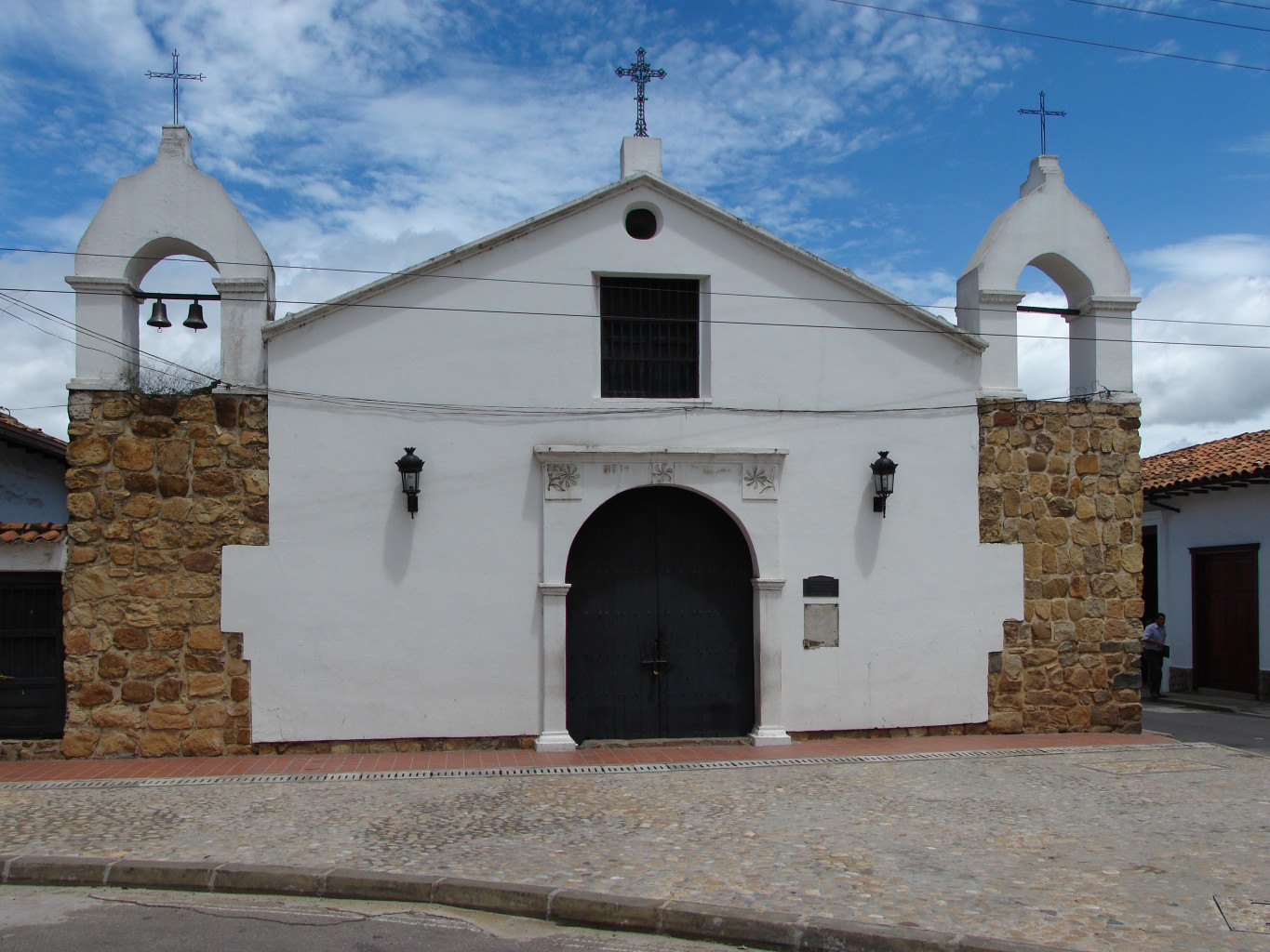 Iglesia de los Dolores en Bucaramanga